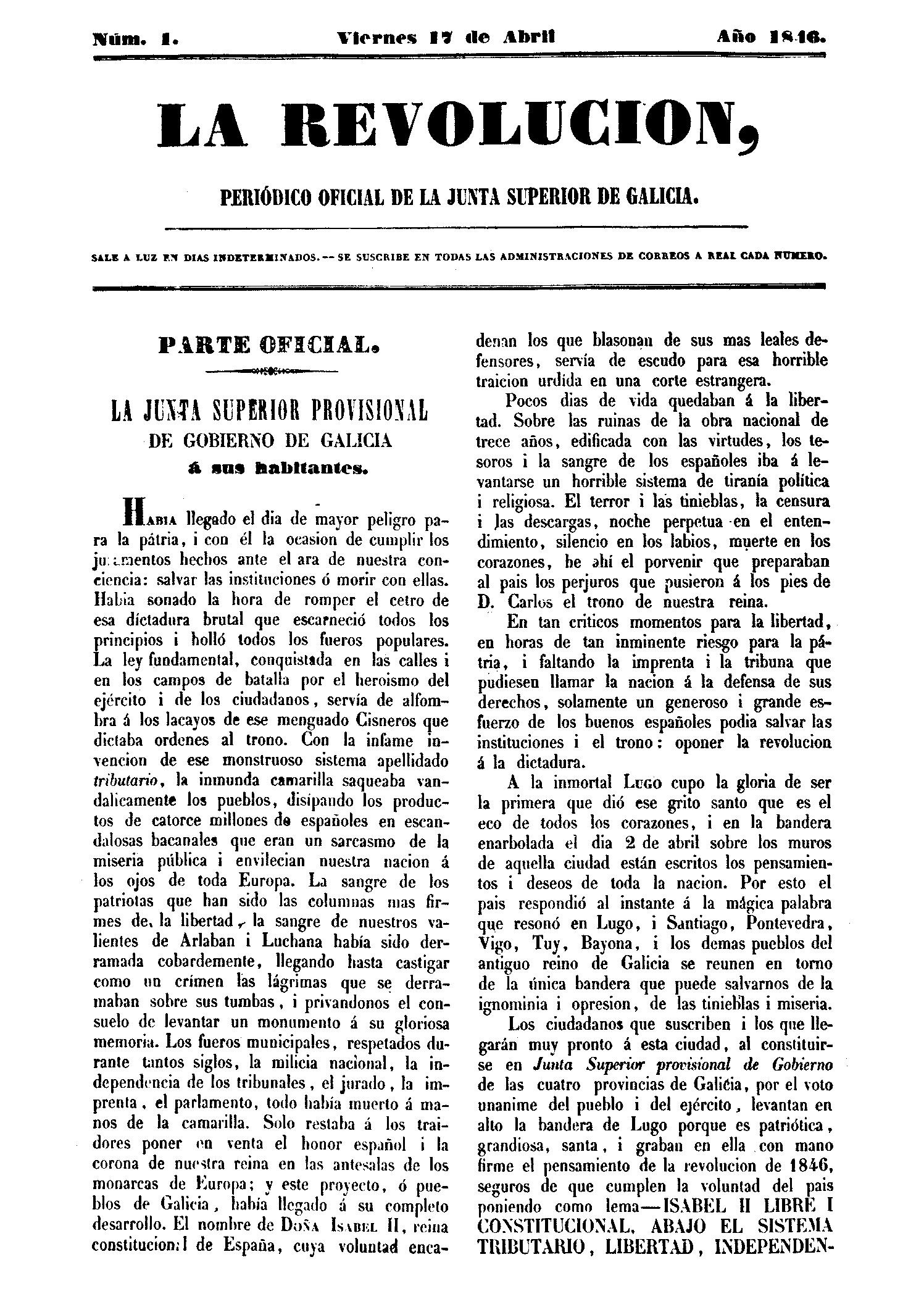 Primera página (página 1 de 4) de La Revolución. Periódico oficial de la Junta Superior de Galicia. Núm. 1.